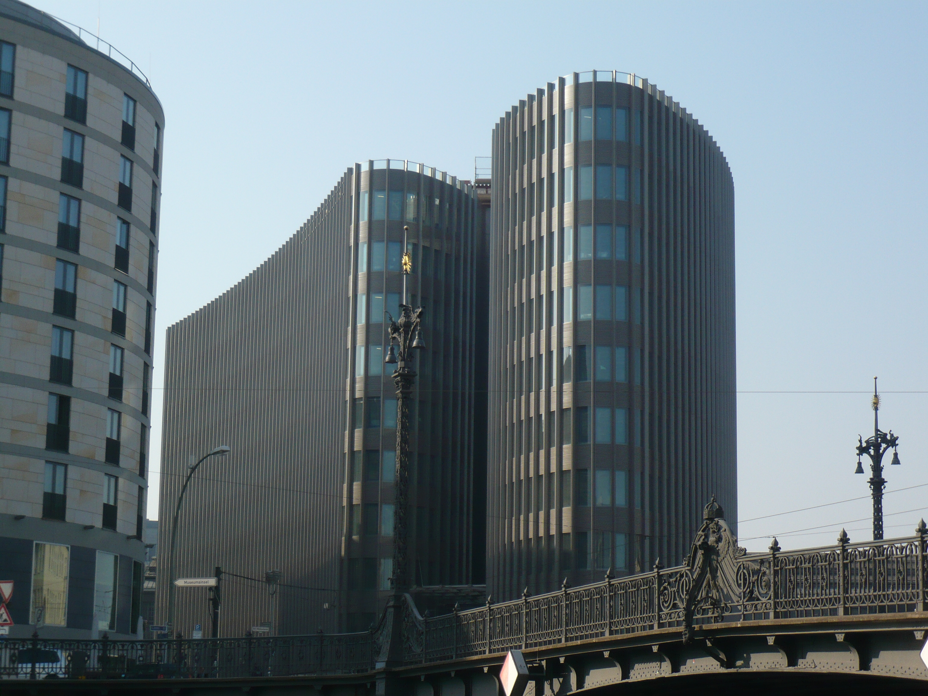 "Spreedreieck" in Berlin-Mitte (2)